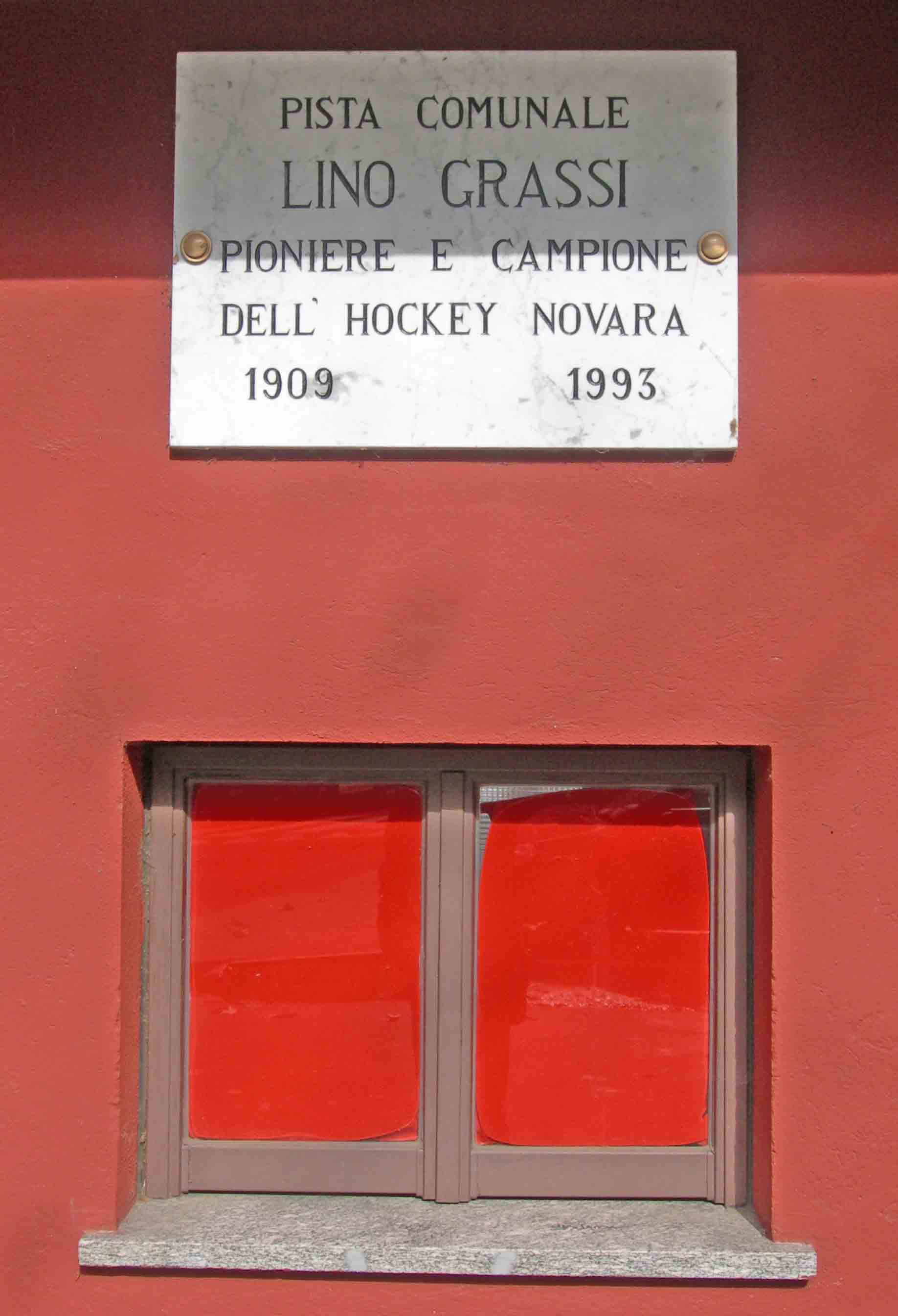 Lino Grassi: targa